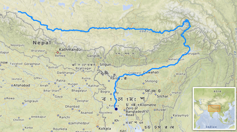 carte réalisée sur umap [1] This map may be incomplete, and may contain errors. Don't rely solely on it for navigation.